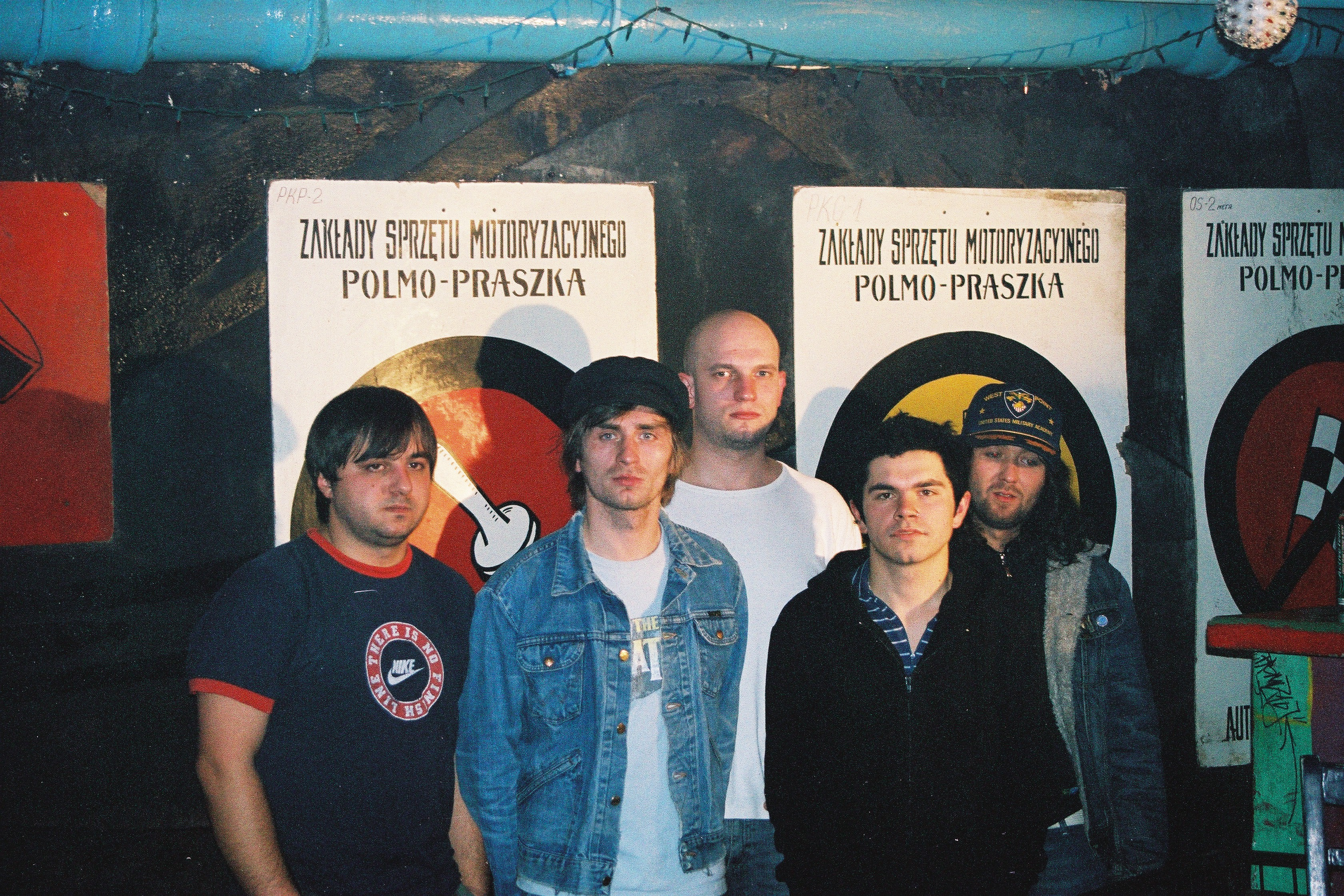 Negatyw: music group from Poland (Mysłowice). Concert in Częstochowa. Pub Utopia. Author: Przykuta Date: 11 02 2006